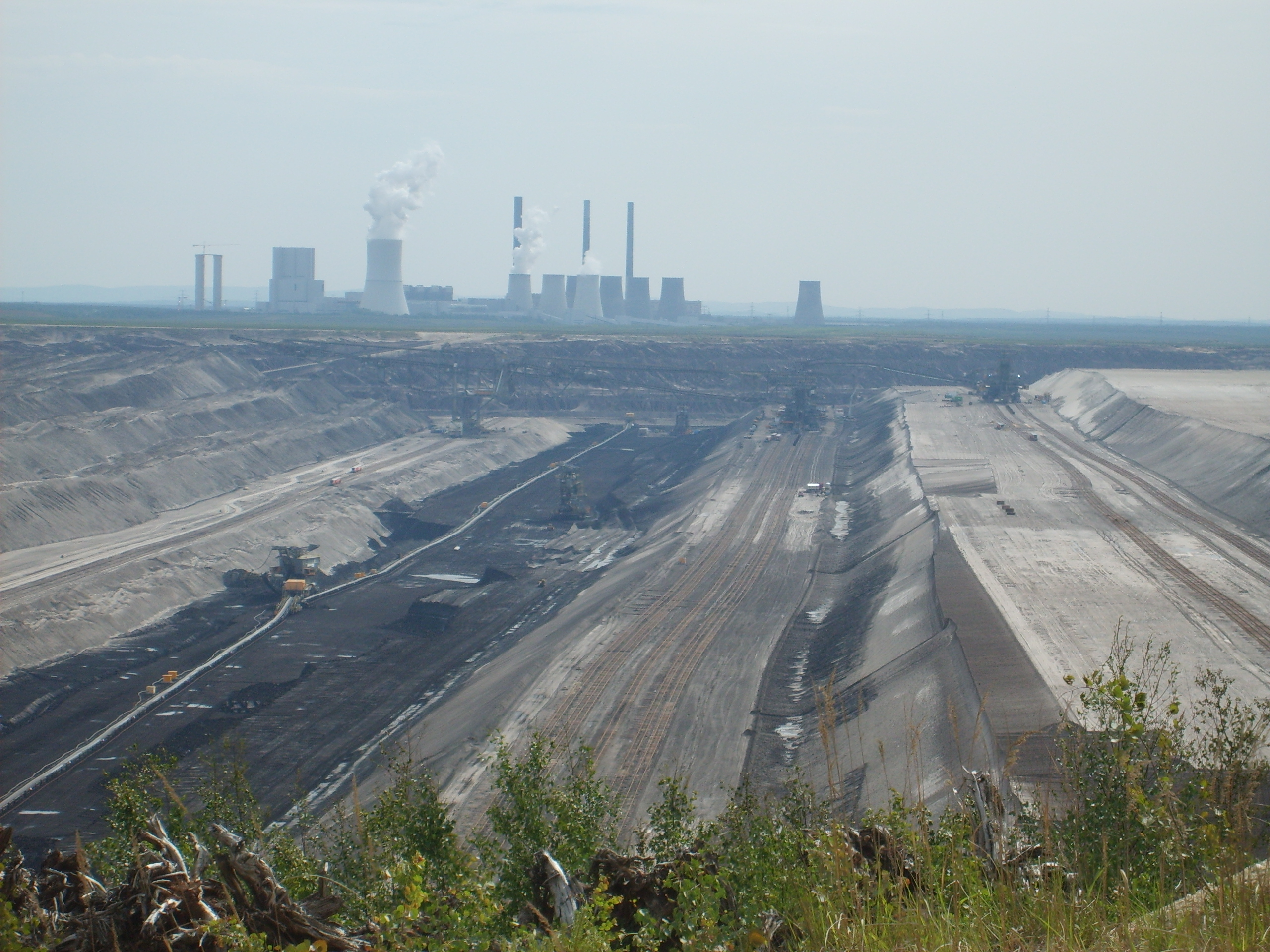 Tagebau Nochten 2007